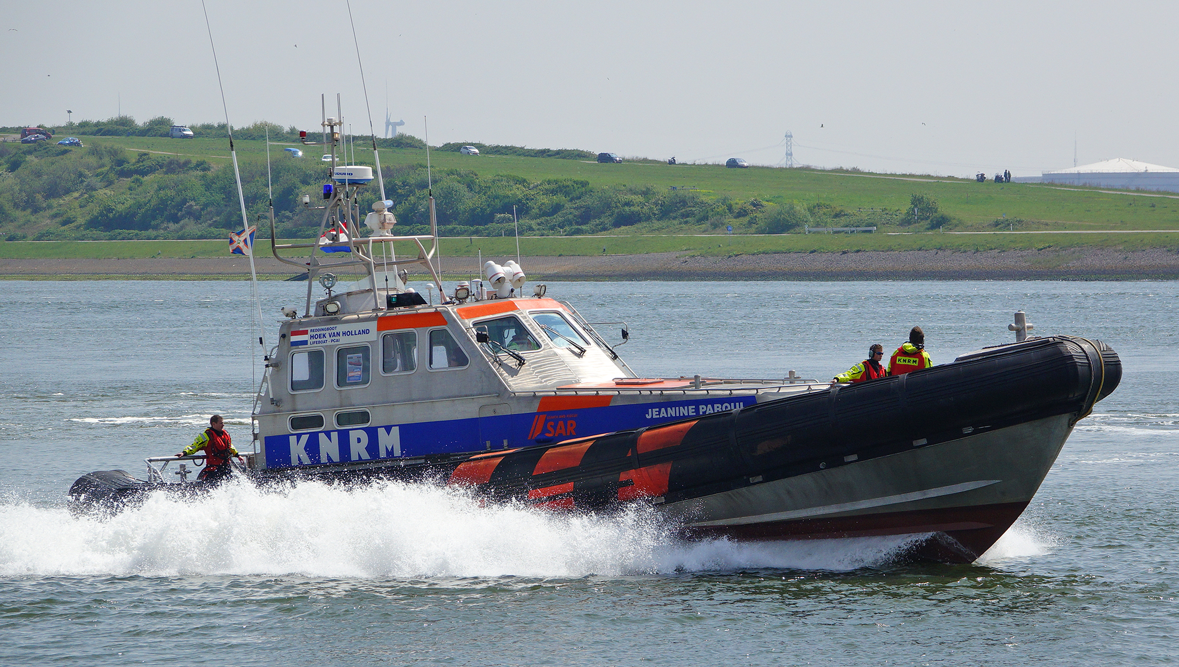 Tijdens de reddingsbootdag van de KNRM moest de JEANINE PARQUI voor een echt noodgeval uitrukken naar de Maasmond om een schip in moeilijkheden te gaan assisteren.